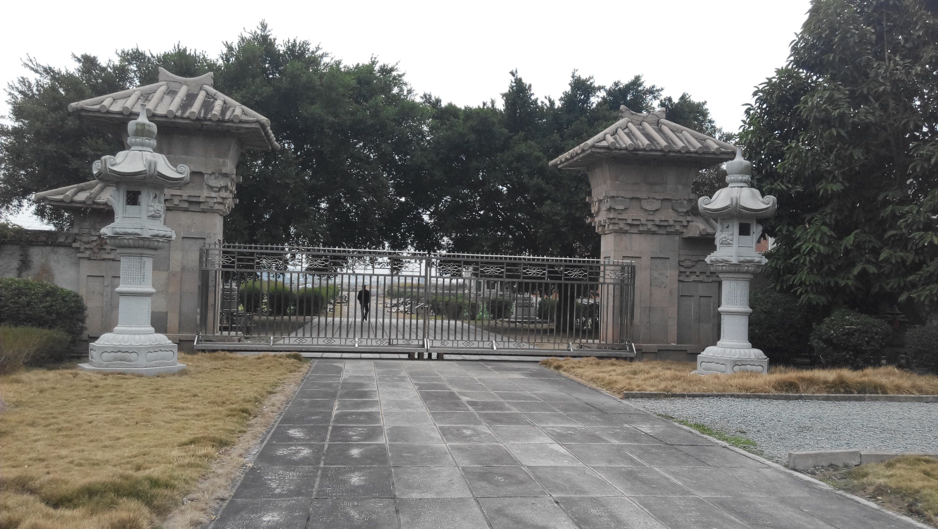 空海大师纪念堂的大门